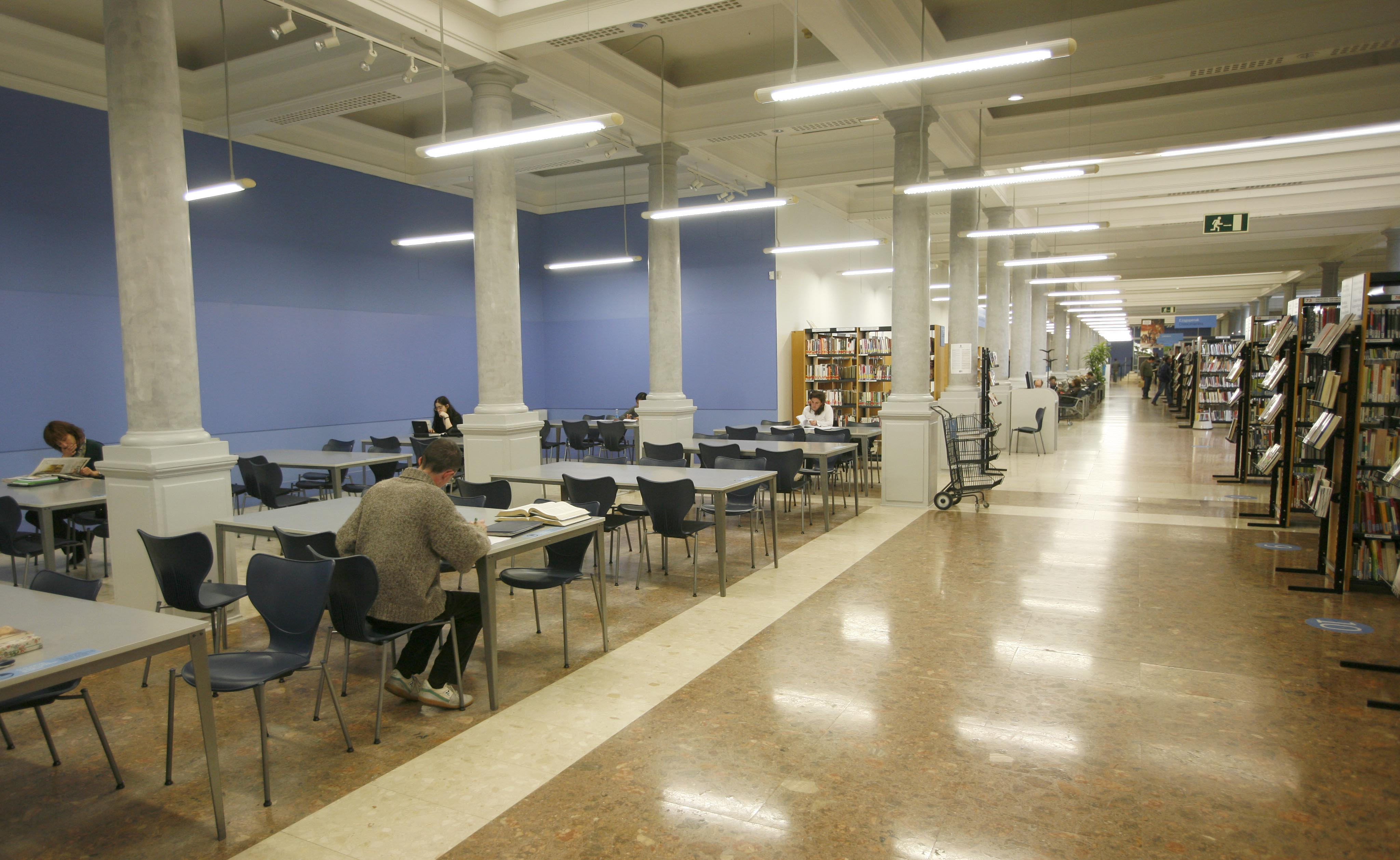 Donostiako Liburutegi Nagusiaren Alderdi Ederreko egoitza